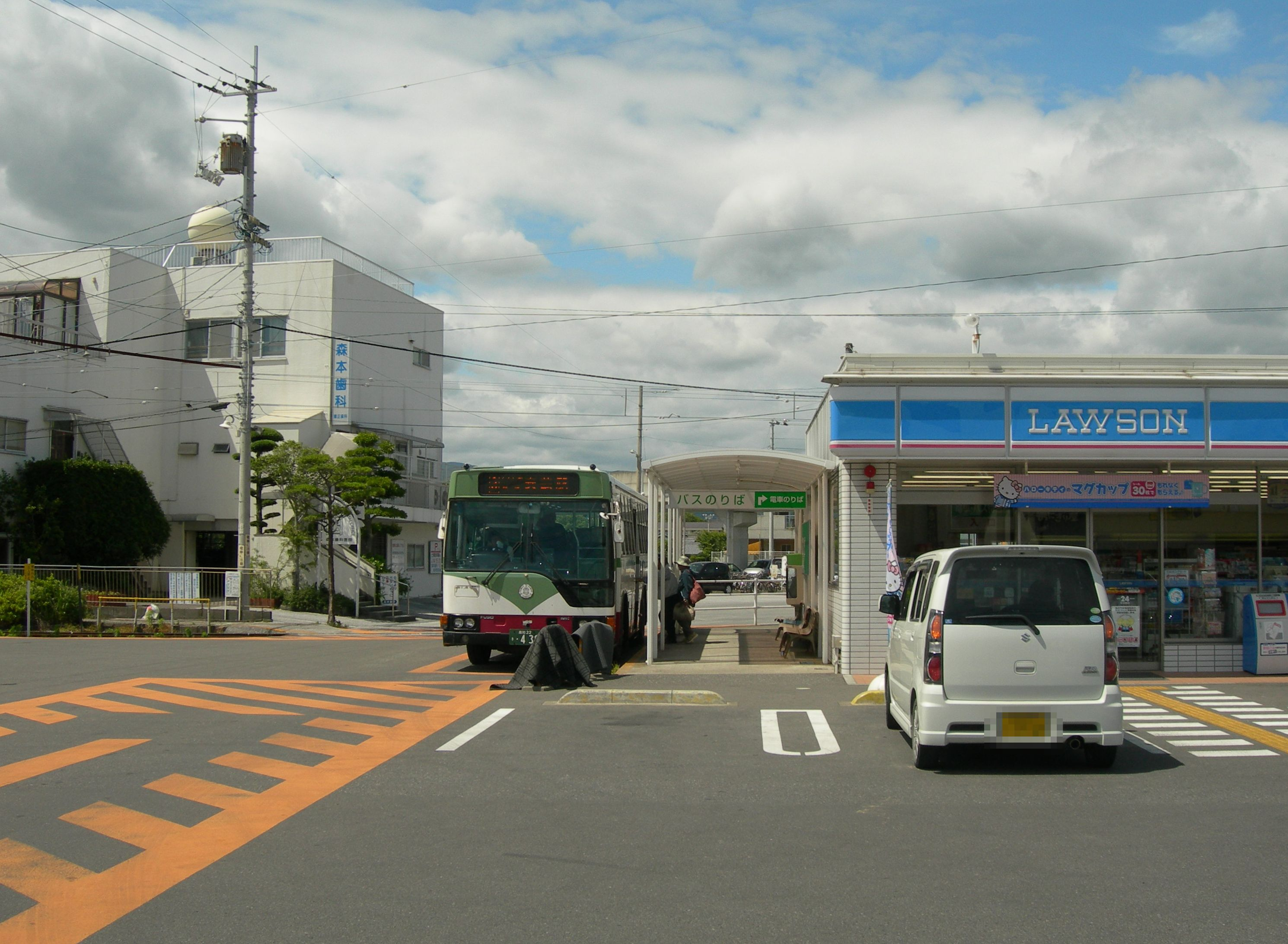 土佐電ドリームサービス後免町バスターミナル・ローソン南国ごめん町駅店